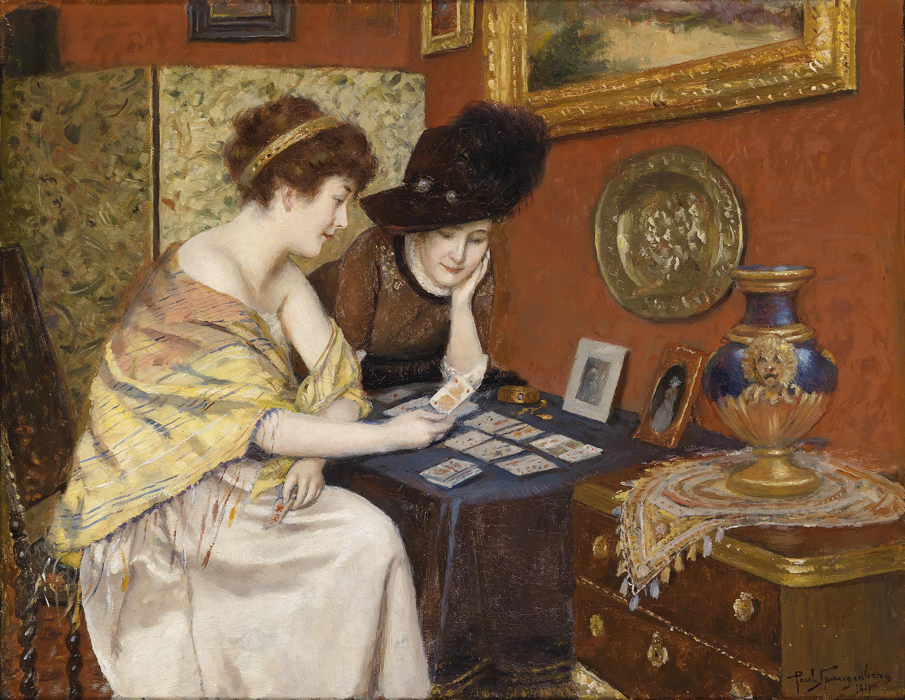 Was steht in den Karten?, signiert, datiert Paul Spangenberg 1911, Öl auf Leinwand, 44 x 57,5 cm